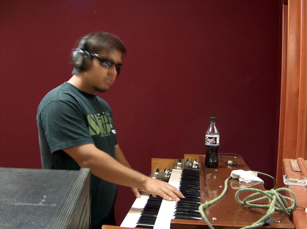 Patrocinado por Coca-Cola Zero